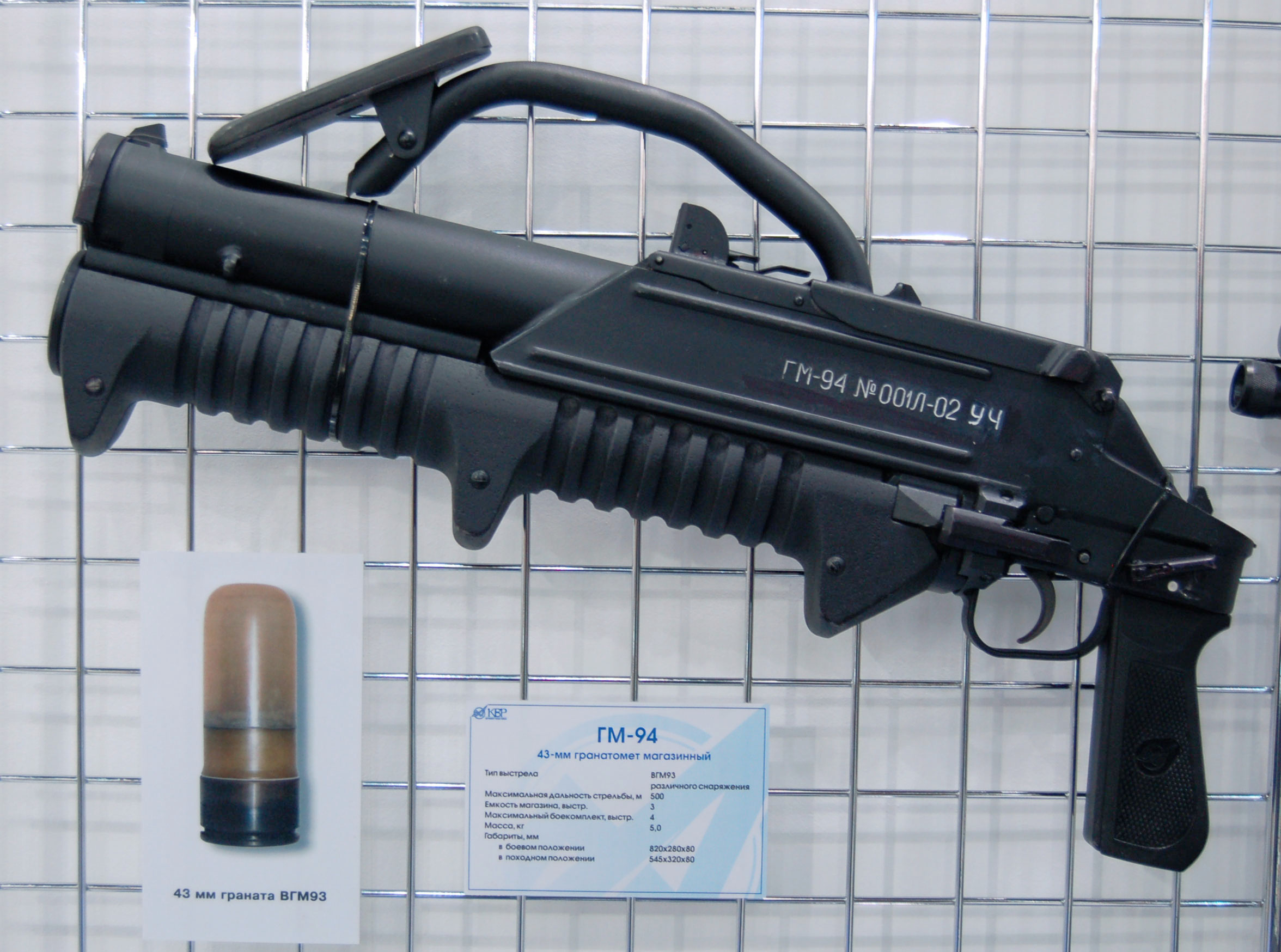 Ручной гранатомёт ГМ-94. МАКС-2009